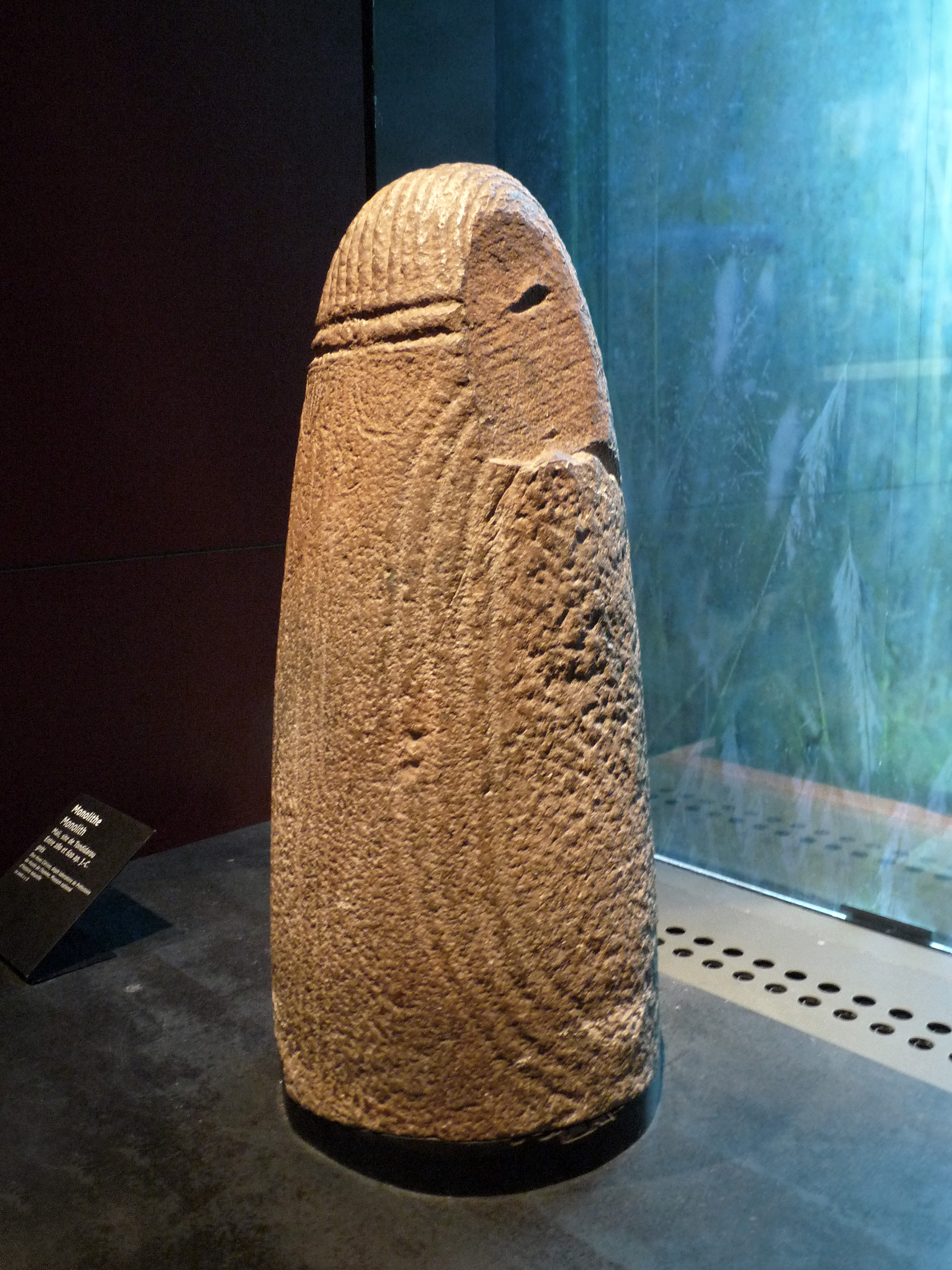 Monolithe. Site de Tondidarou, Mali. Grès. Entre 280 et 620 après JC. Musée du quai Branly.